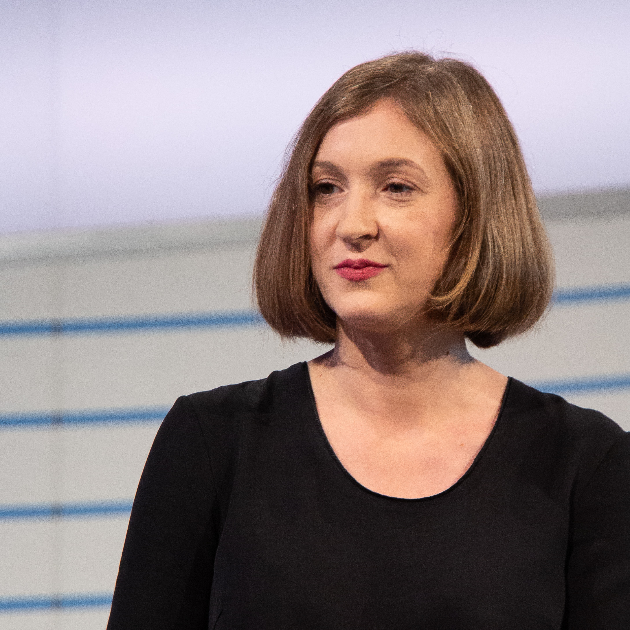 Buchpreisträgerin Inger-Maria Mahlke im Gespräch mit Cécile Schortmann auf der ARD-Bühne der Frankfurter Buchmesse 2018